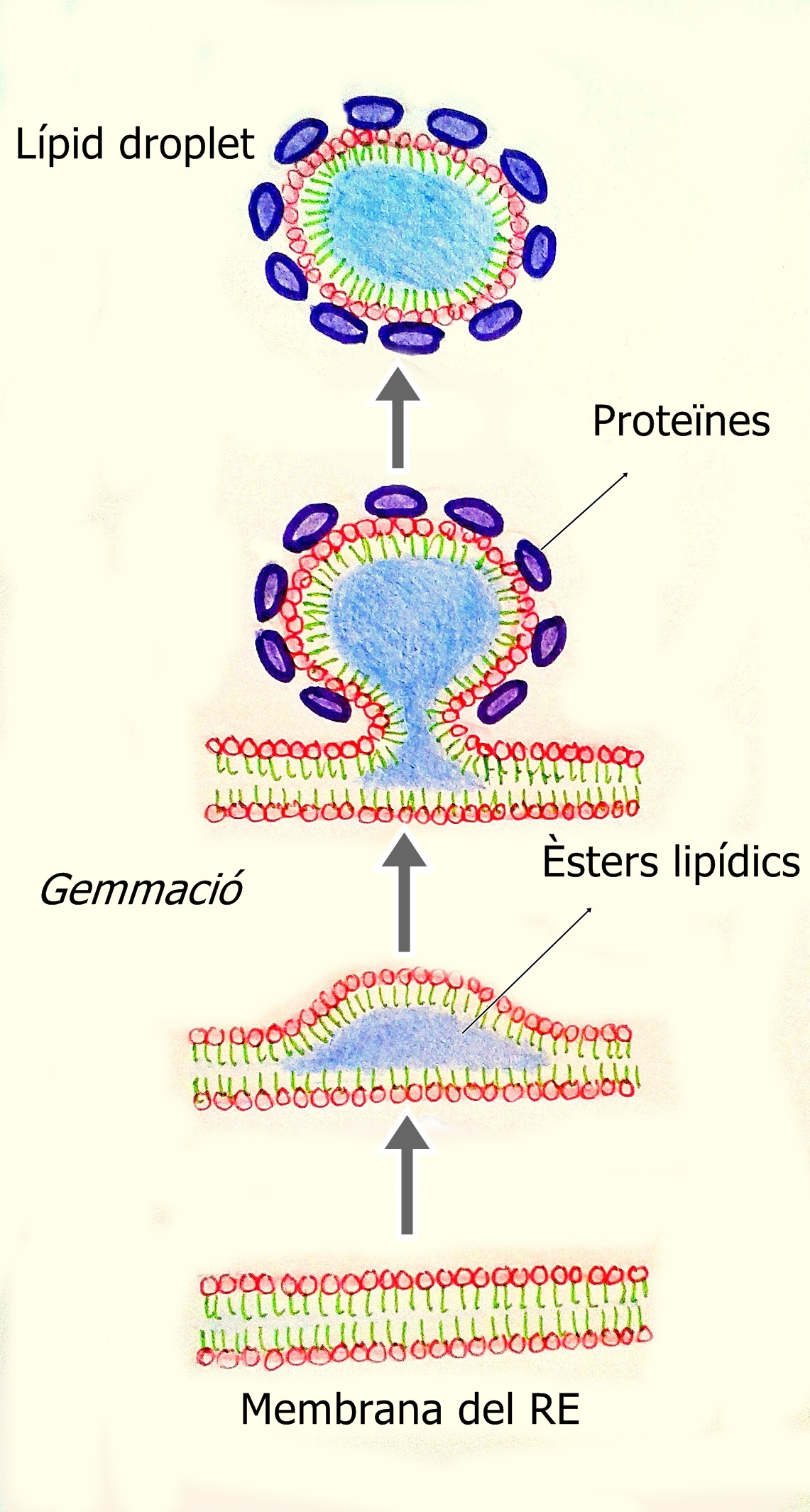 Biogènesi dels Lípid Droplets en el Reticle Endoplasmàtic